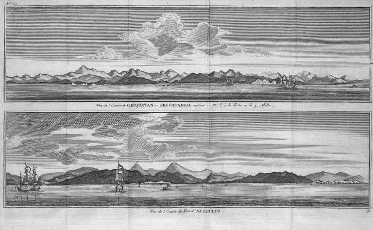 [Illustrations de Voyage autour du monde] Auteur : George Anson Éditeur : Henri-Albert Gosse et Compagnie (Genève) 1750